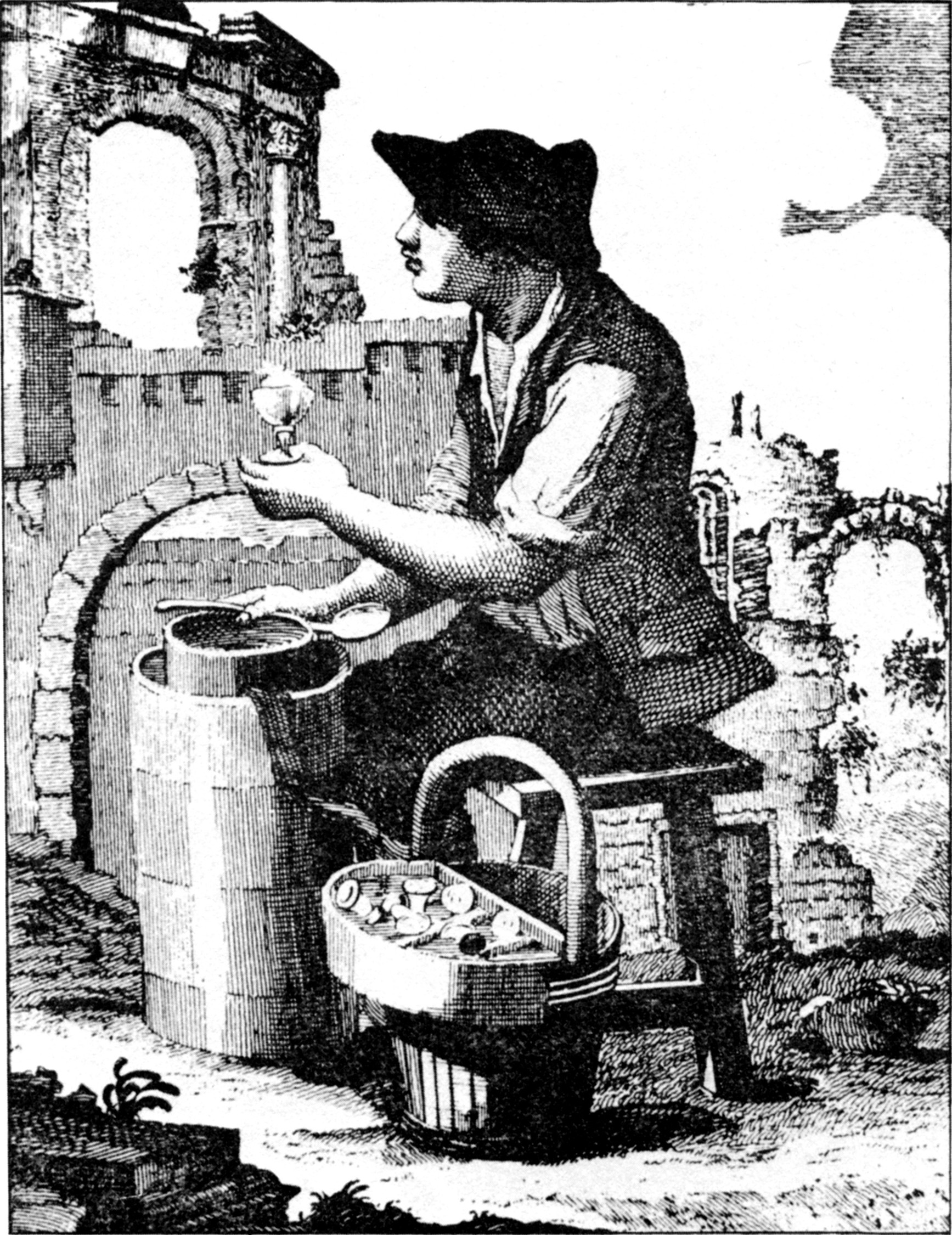 Eisverkäufer in Rom. Innereinandergestellte Gefässe mit Isoliermittel oder Kältemischung dazwischen. Stich von Secondo Bianchi